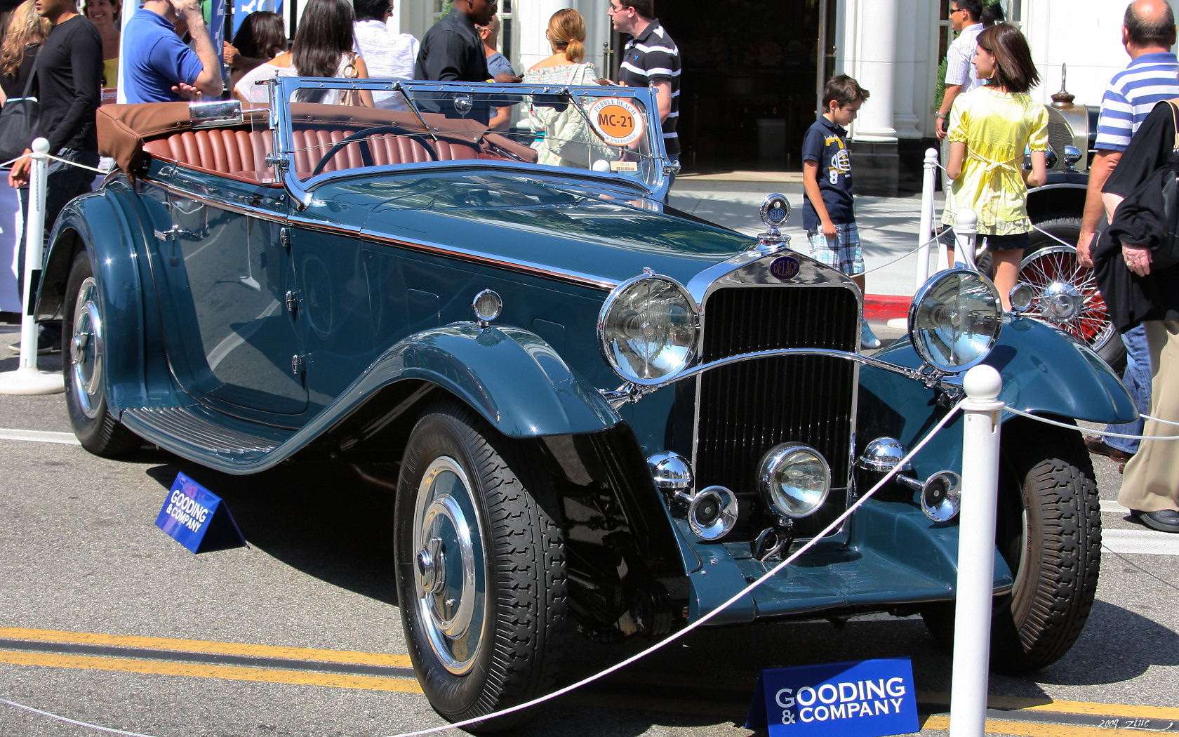 1932 Delage D8 SS Chapron Cabriolet